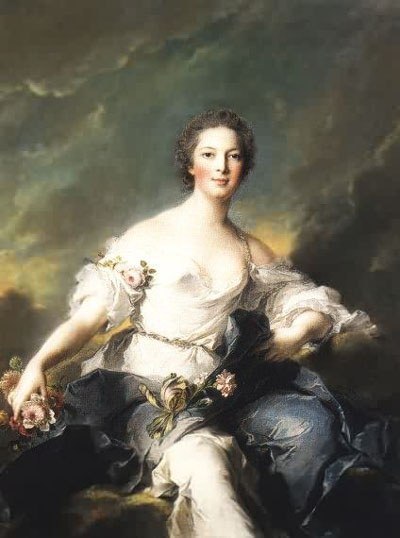 Portrait of Angélique d'Allonville de Louville (1710-1756)